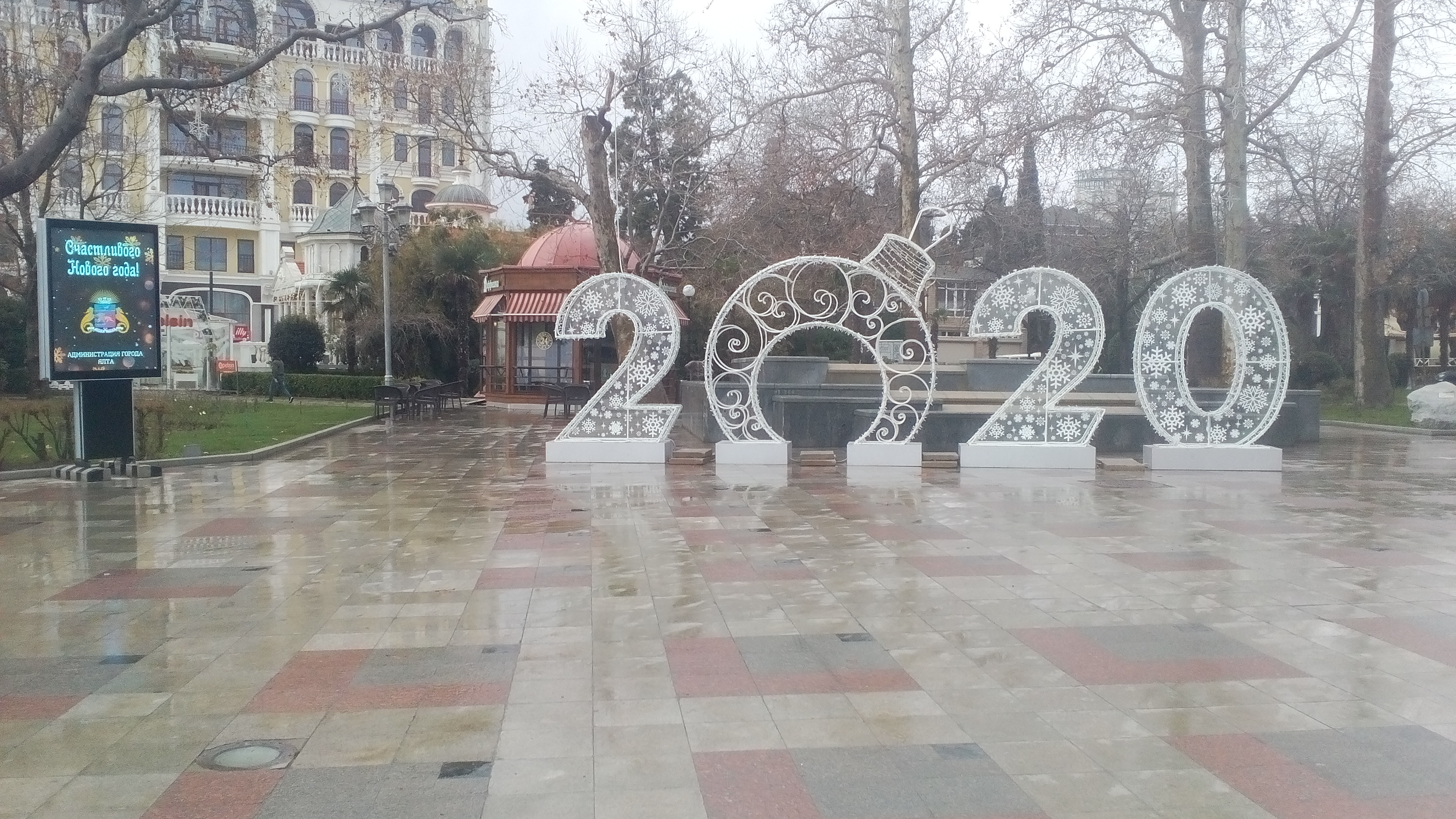 Набережная Ялты в канун Нового Года - 2020.